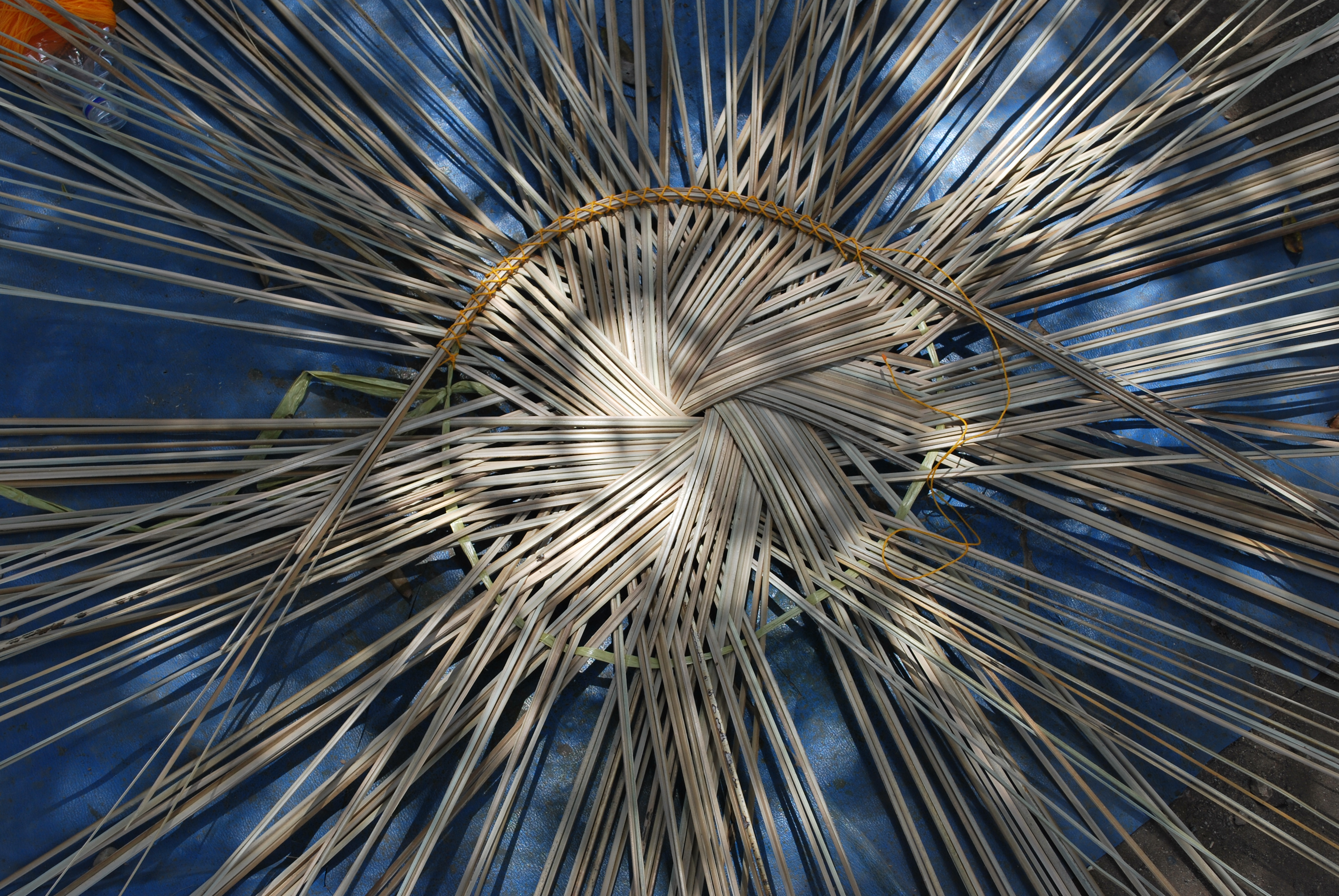 Möbelproduktion aus Binsen in Baucau